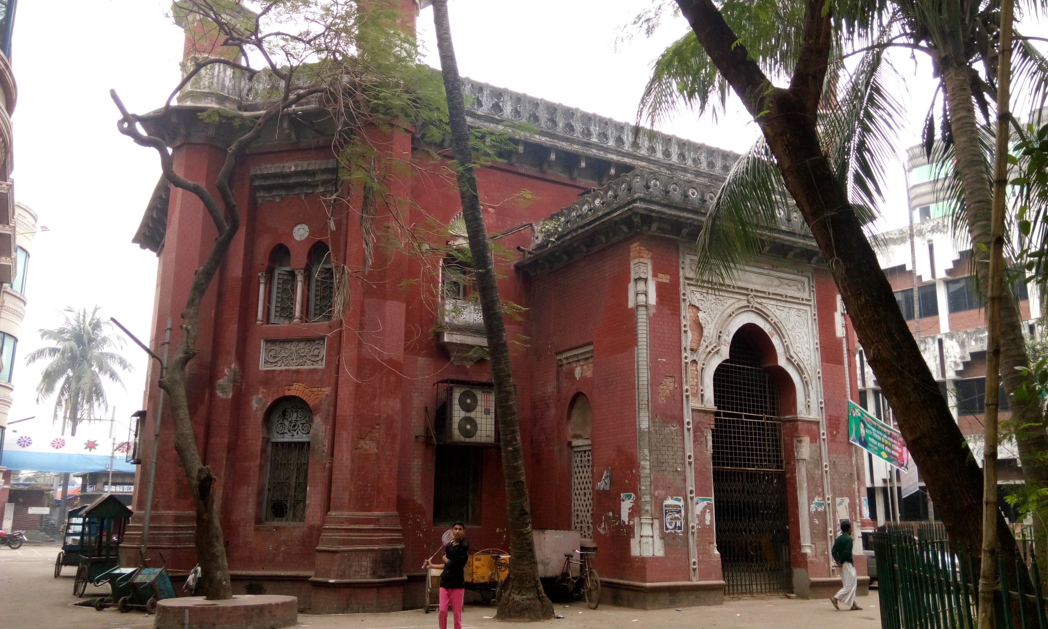 ঢাকার একটি ঐতিহাসিক নিদর্শন।